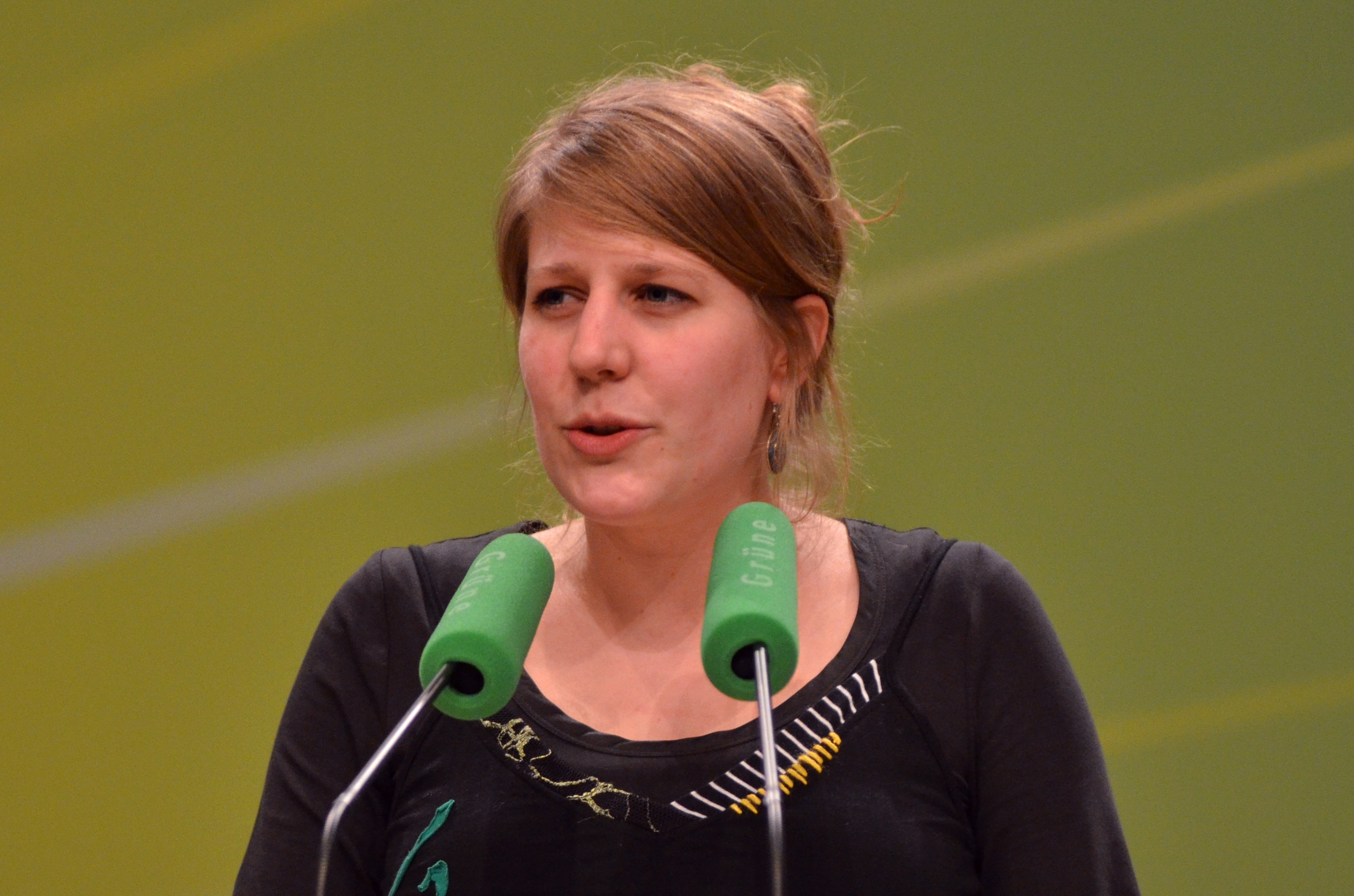 Verena Schäffer